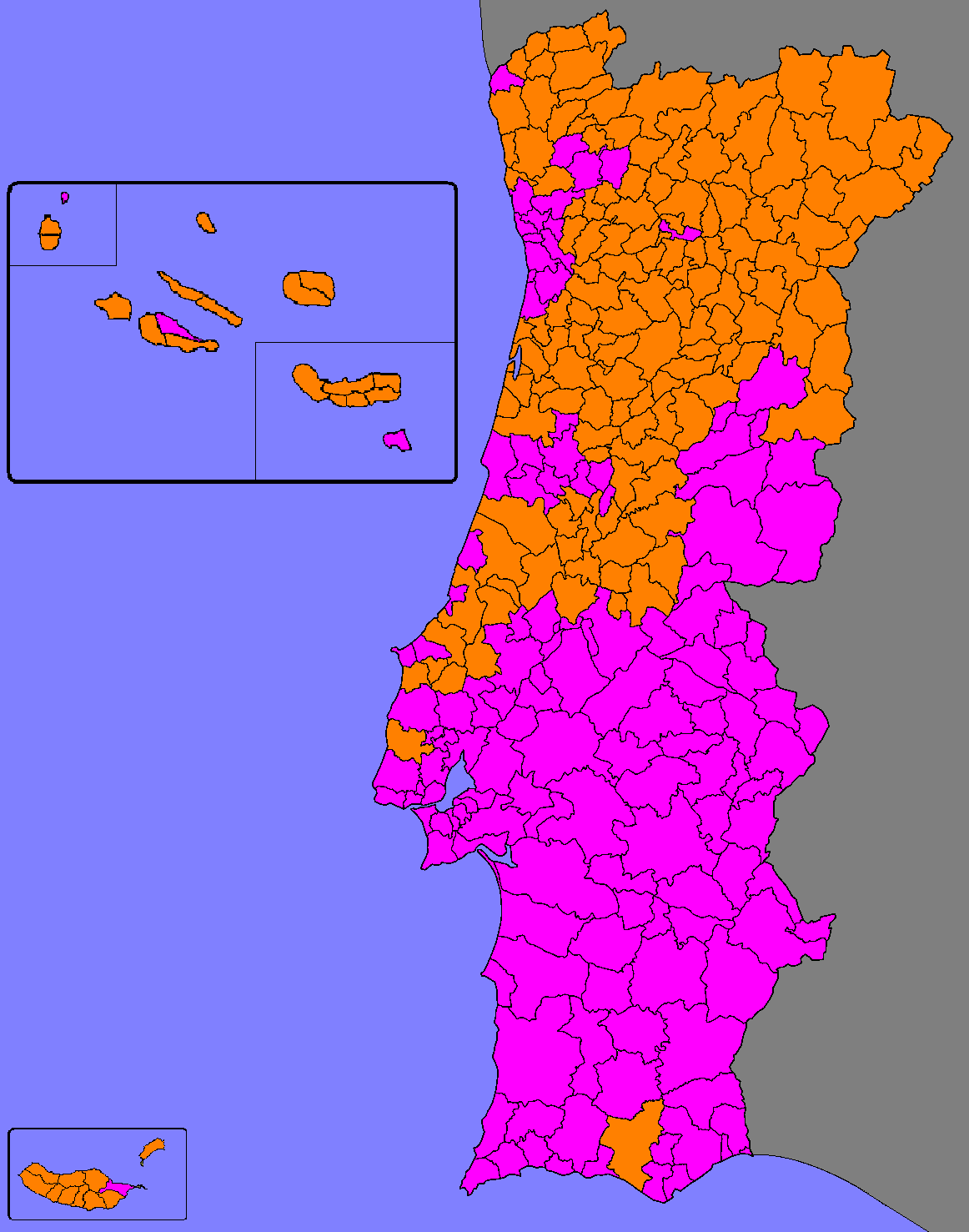 Mapa ilustrativo do candidato mais votado por concelho